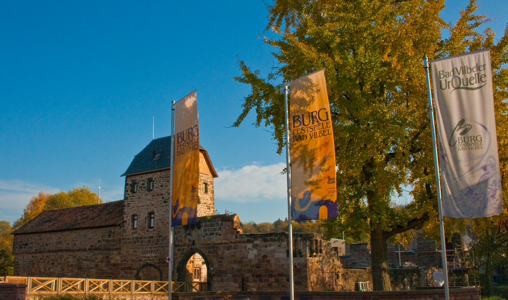 Historische Wasserburg mit den jährlich stattfindenden Burgfestspielen